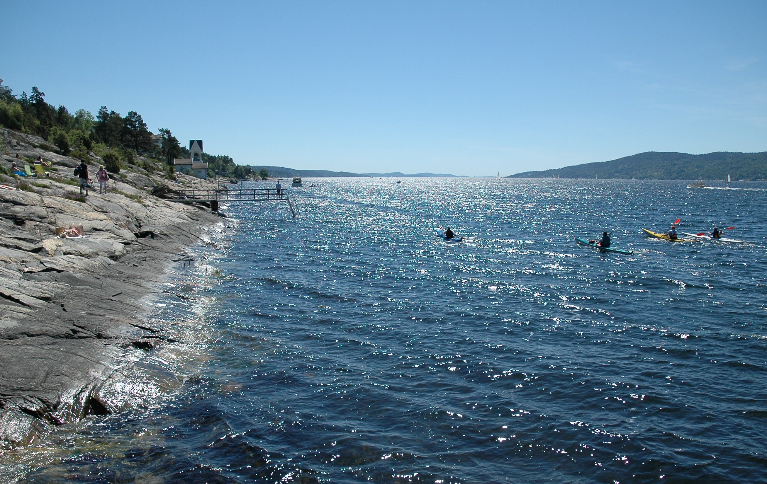 Torkildstranda sør mot Elle tåkeklokke.